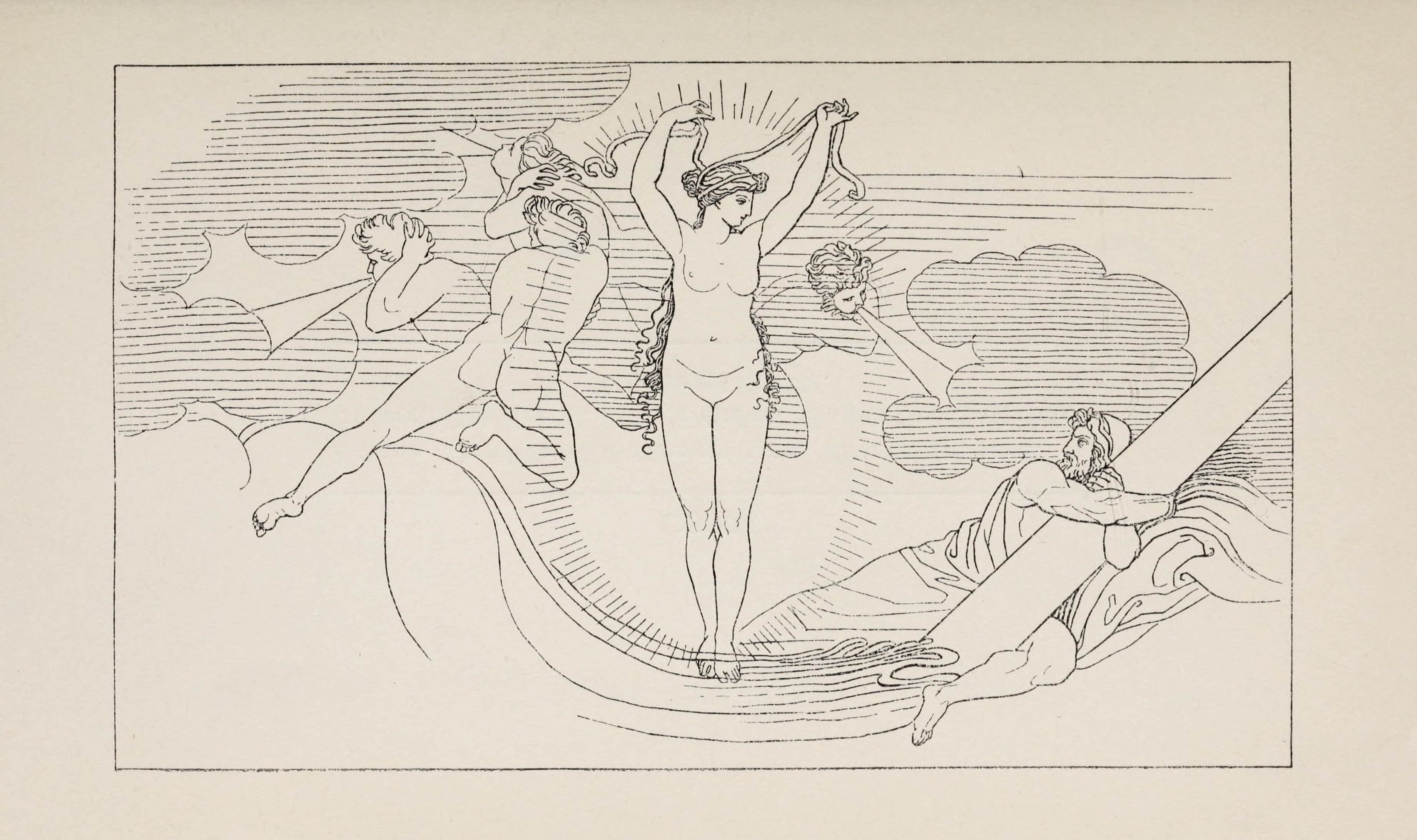 Leukothea, Odysseus den rettenden Schleier reichend. – Homer, Odyssee V. 337. Schwab, Sagen des klassischen Altertums II. 230.